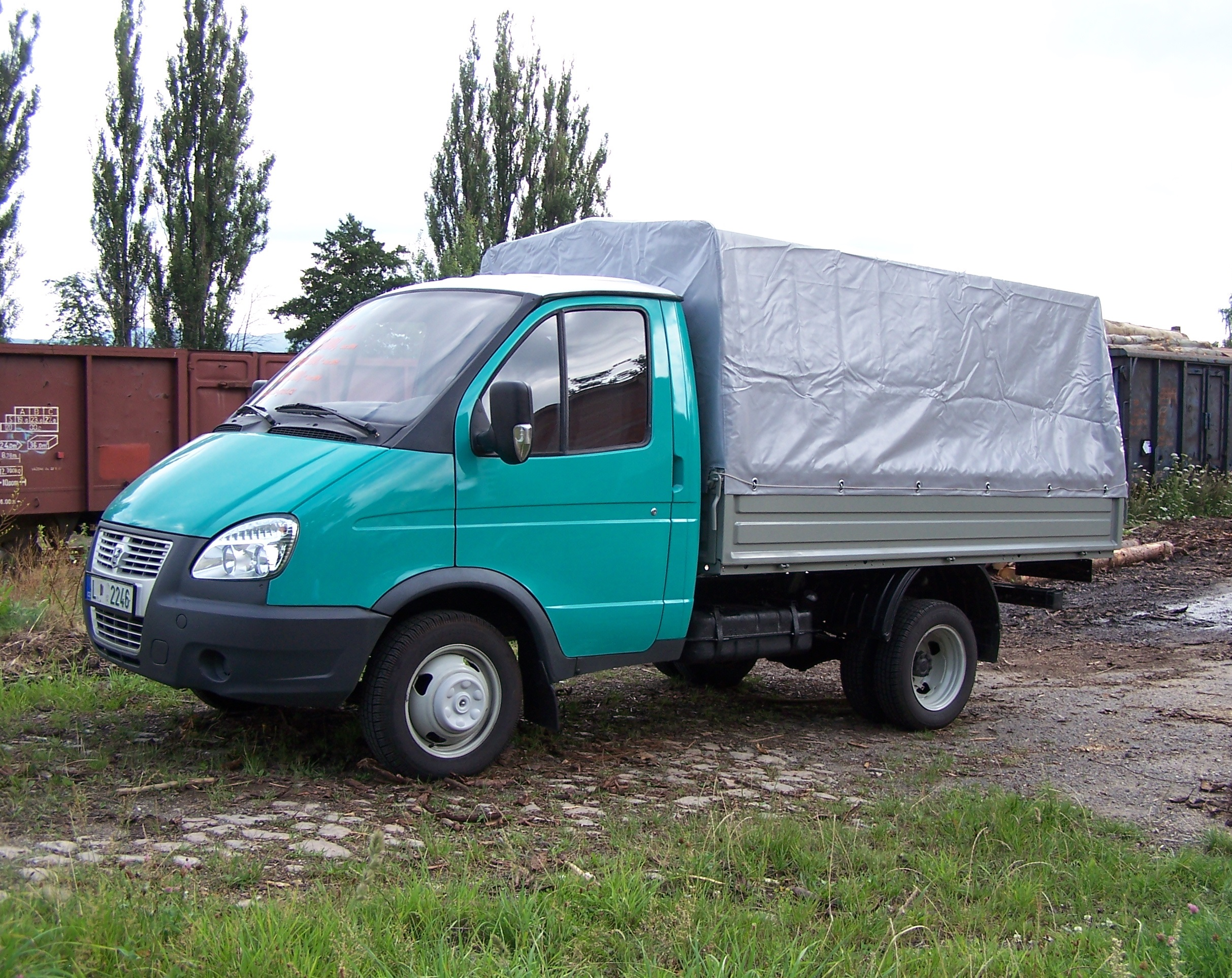 GAZ GAZelle 3302 (3 místa, 4x2) v provedení valník s plechovými bočnicemi